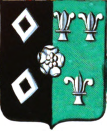 Armes de la famille Pangaert d'Ordorp. Blasonnement: "parti de sable, à deux macles d'argent, et de sinople, à trois fleurs de lys au pied coupé d'argent, et en abîme une rose de même."